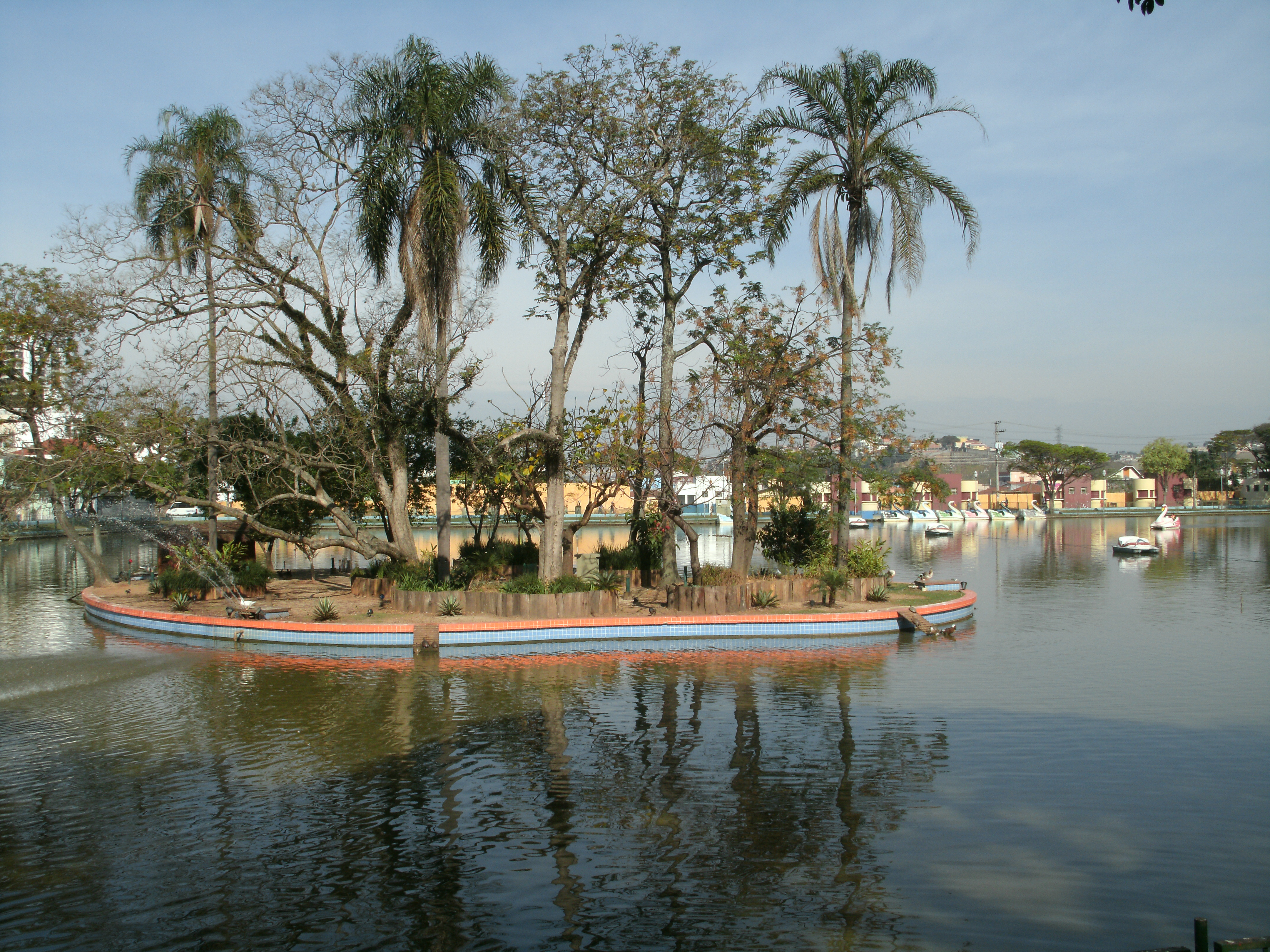 ILHA-LAGO DOS PATOS-GUARULHOS-SP